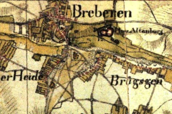 Kartenaufnahme der Rheinlande 1804/05